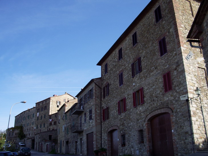 Tratto nord-occidentale della cerchia muraria di Pari (GR)